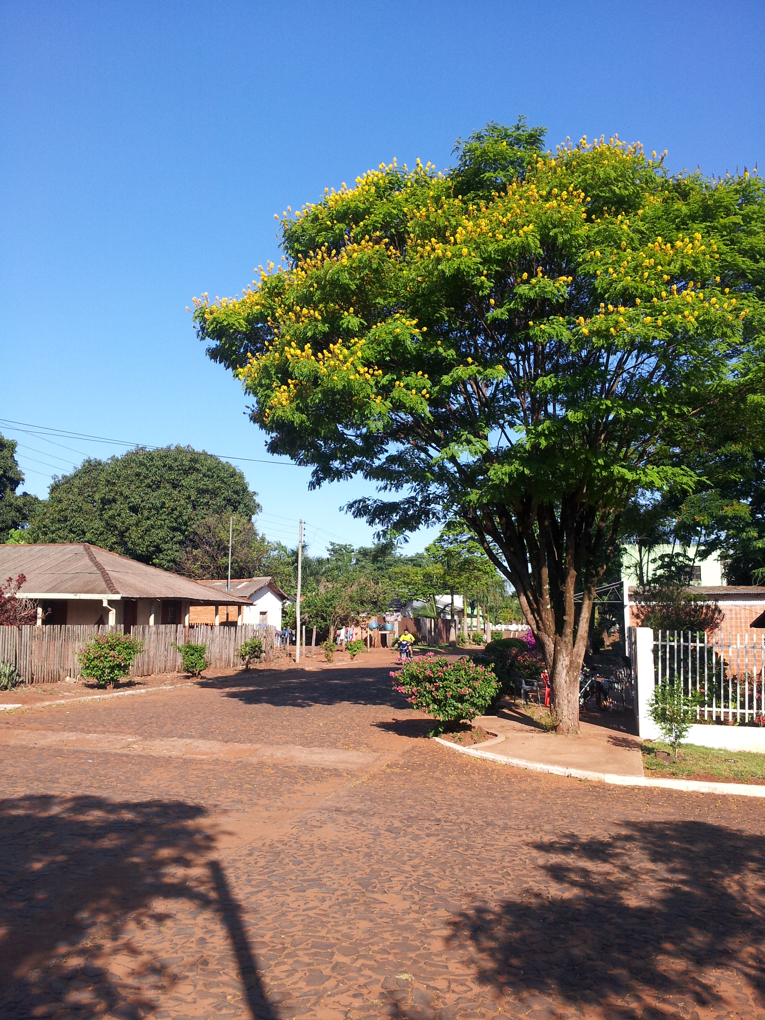 Esquina de la calle 14 de Mayo y Defensores del Chaco en la ciudad de La Paloma, Canindeyú, Paraguay